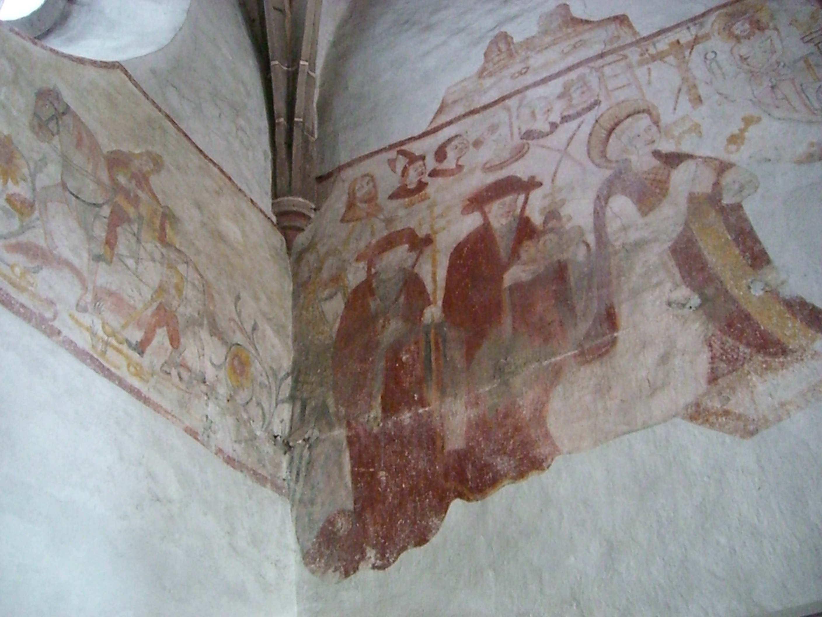 Wandmalereien in der evang.-luth. Kirche St. Maria, Weißdorf